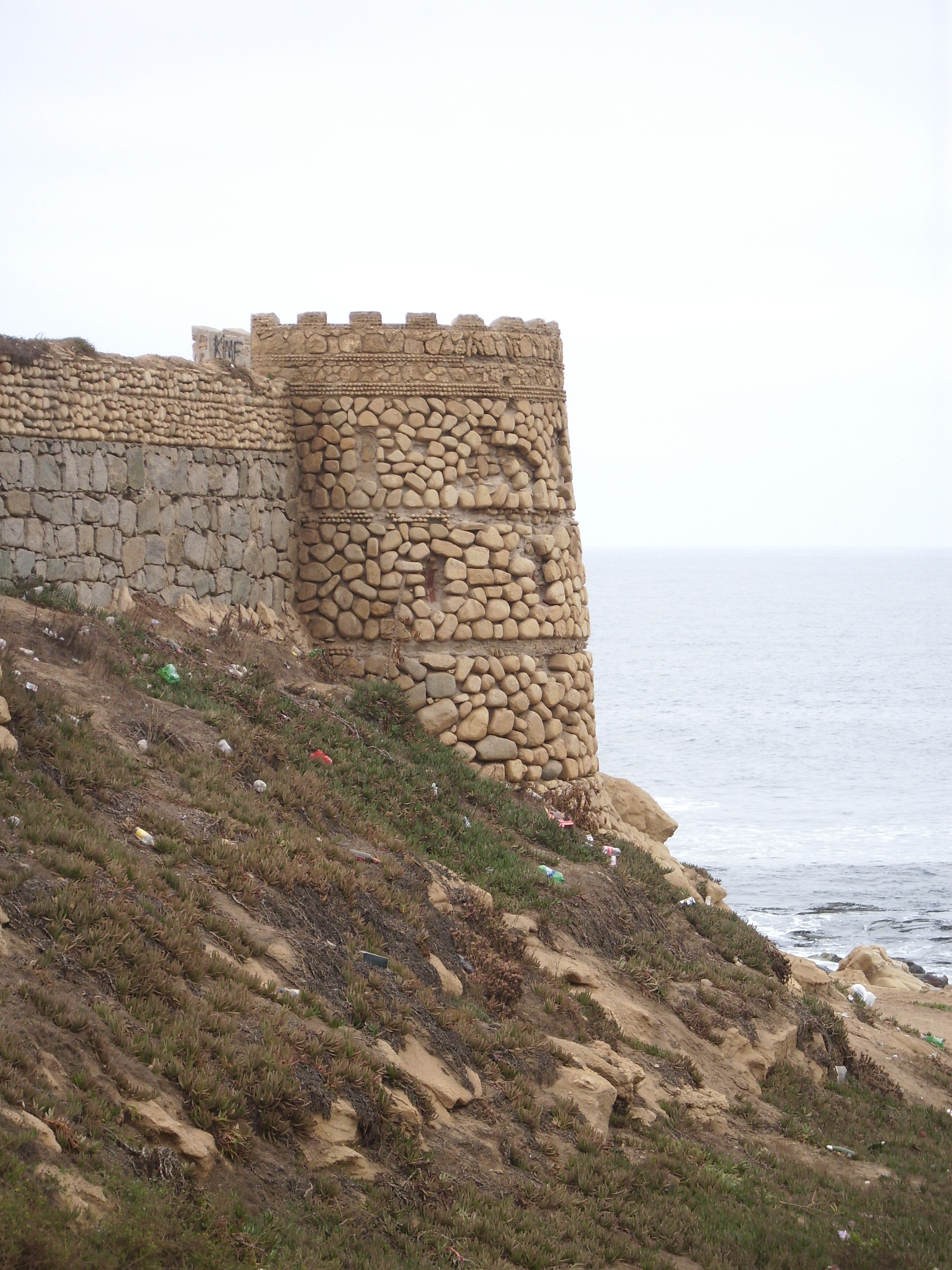 El mirador del Castillo Sanfuentes, ubicado en la comuna de Quintero, V Región de Valparaíso, Chile.